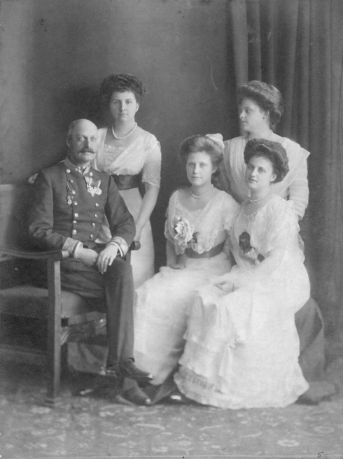 Die Erzherzog Leopold Salvator von Österreich-Toskana mit Familie.